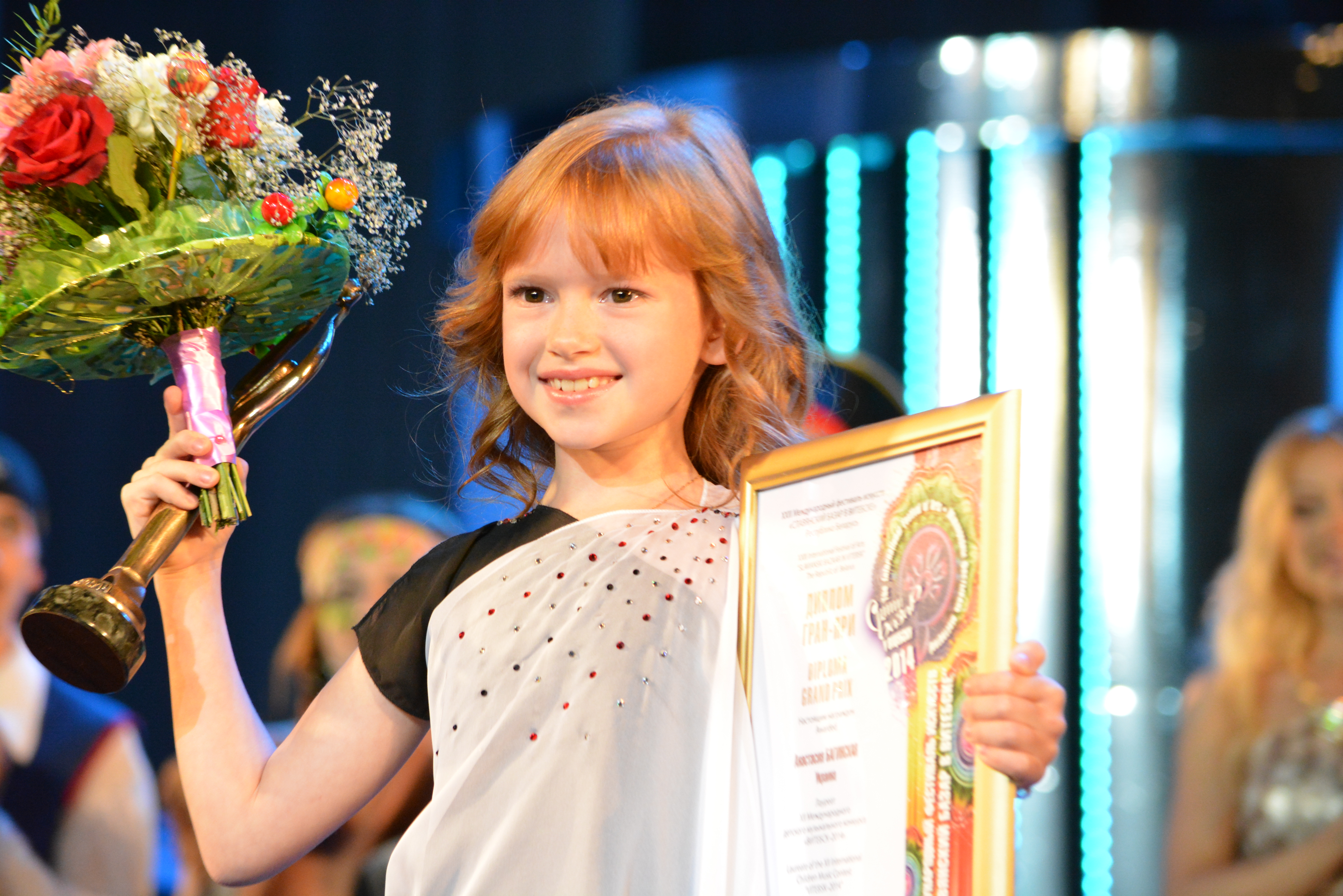 Анастасия Багинская на Славянском Базаре 2014